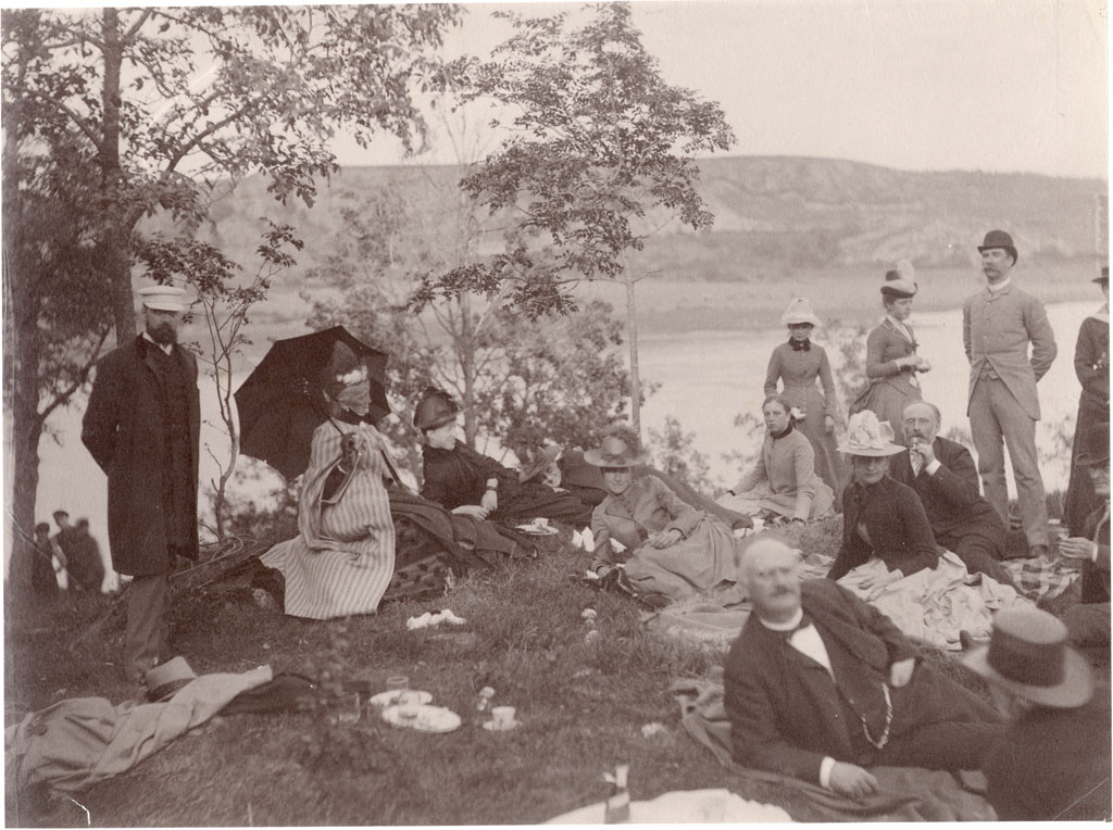 People on a picnic. Människor på utflykt. Parish (socken): Lysekil Province (landskap): Bohuslän Municipality (kommun): Lysekil County (län): Västra Götaland Photograph by: Carl Curman Date: 1880s Format: Albumen print Persistent URL: Read more about the photo database (in english)